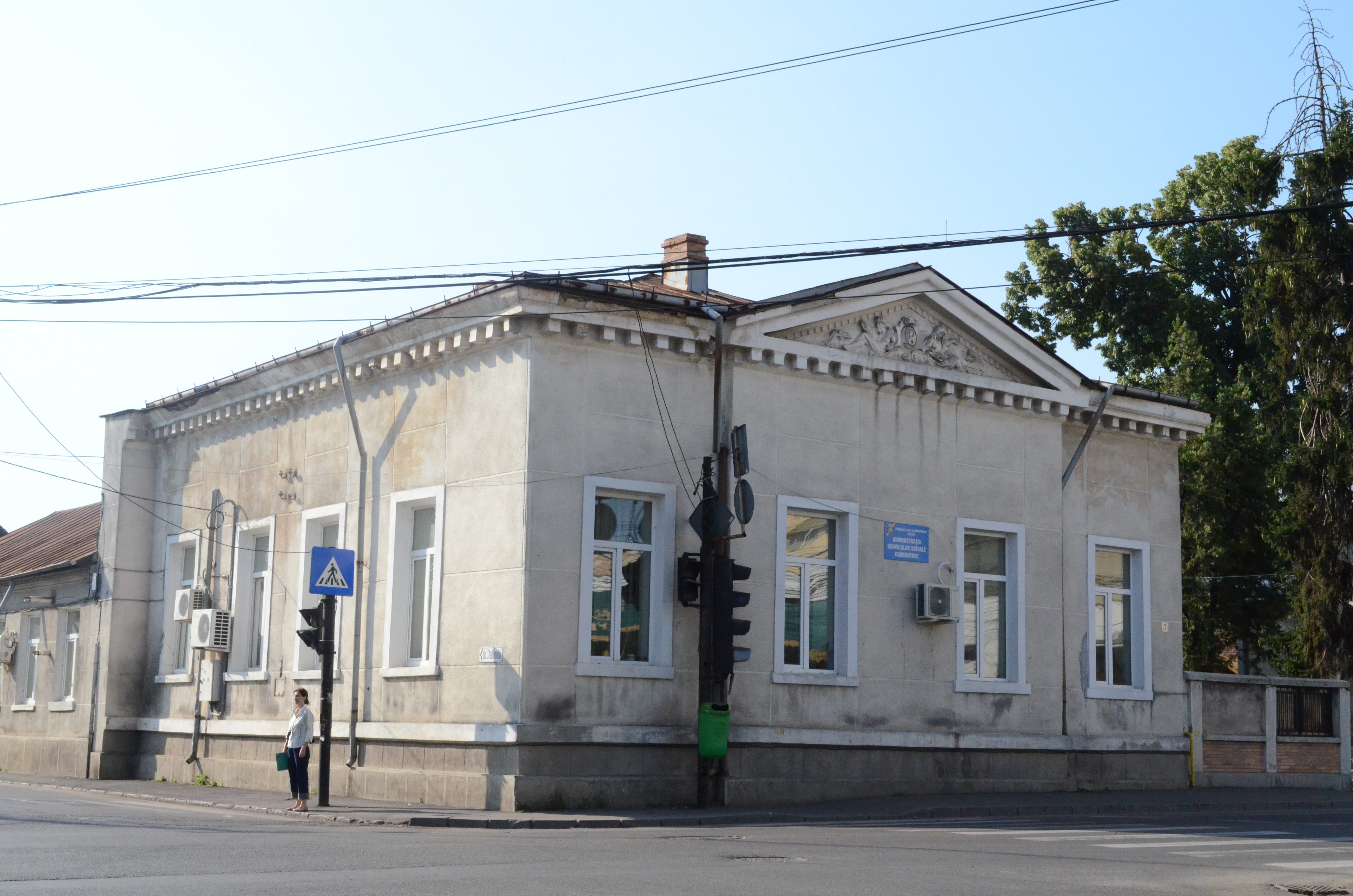 Casa Tulea, azi sediu Administrația Serviciilor Sociale Comunitare